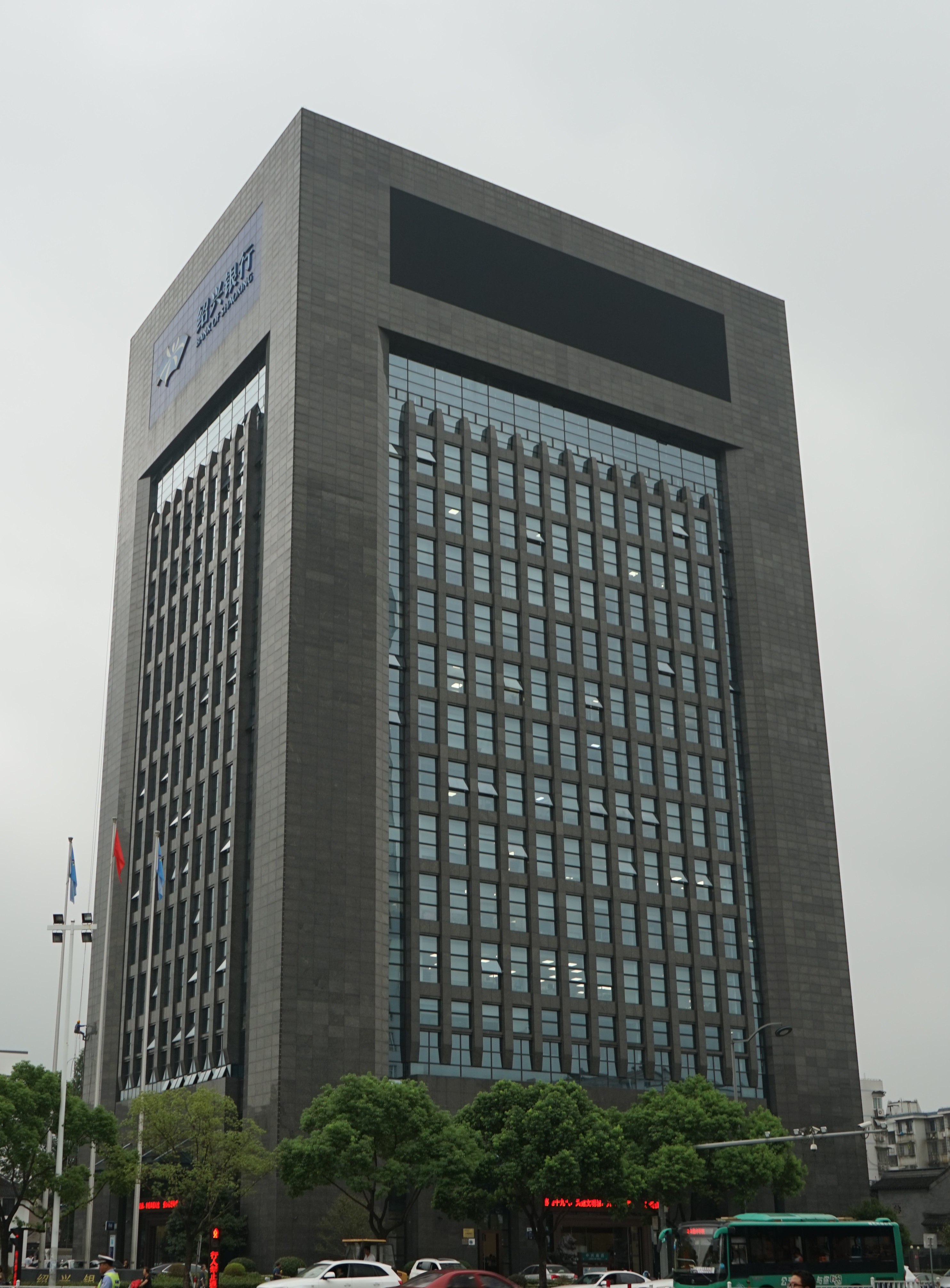 绍兴银行大楼